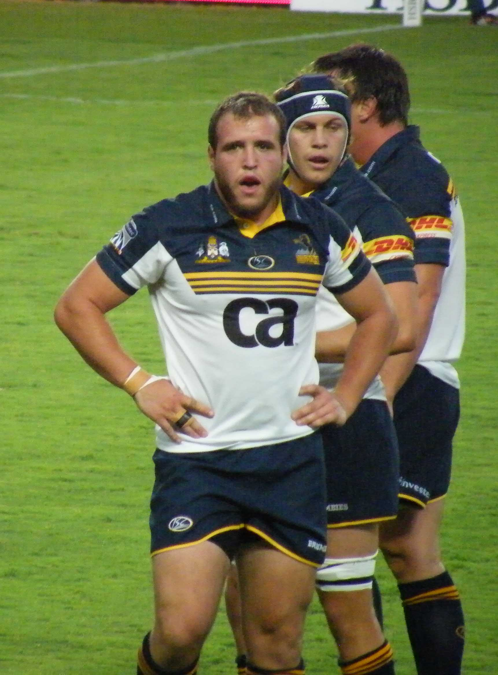 Brumbies Prop Forward Ben Alexander